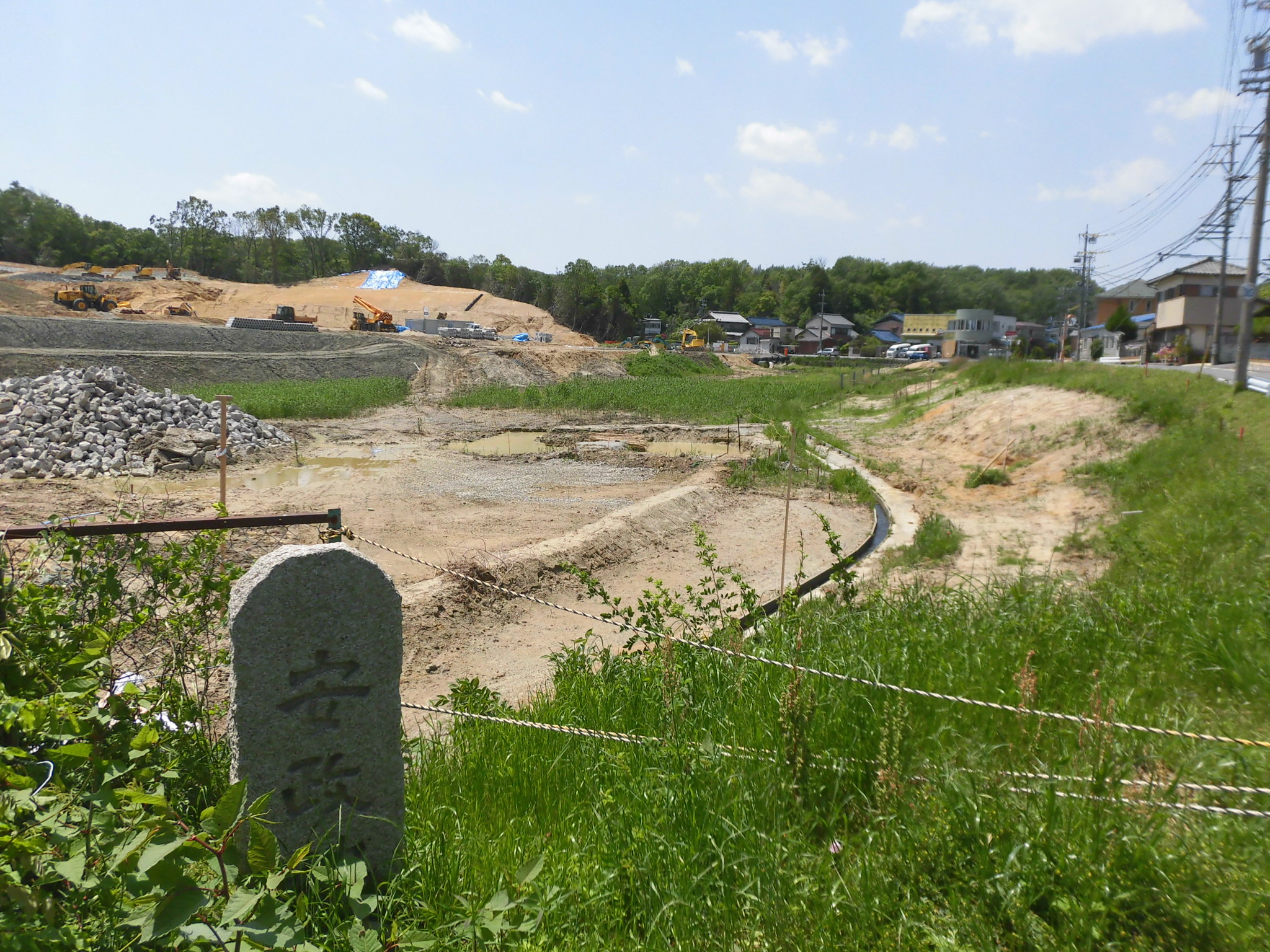 1945年7月24日 四日市 安政池 模擬原爆着弾地